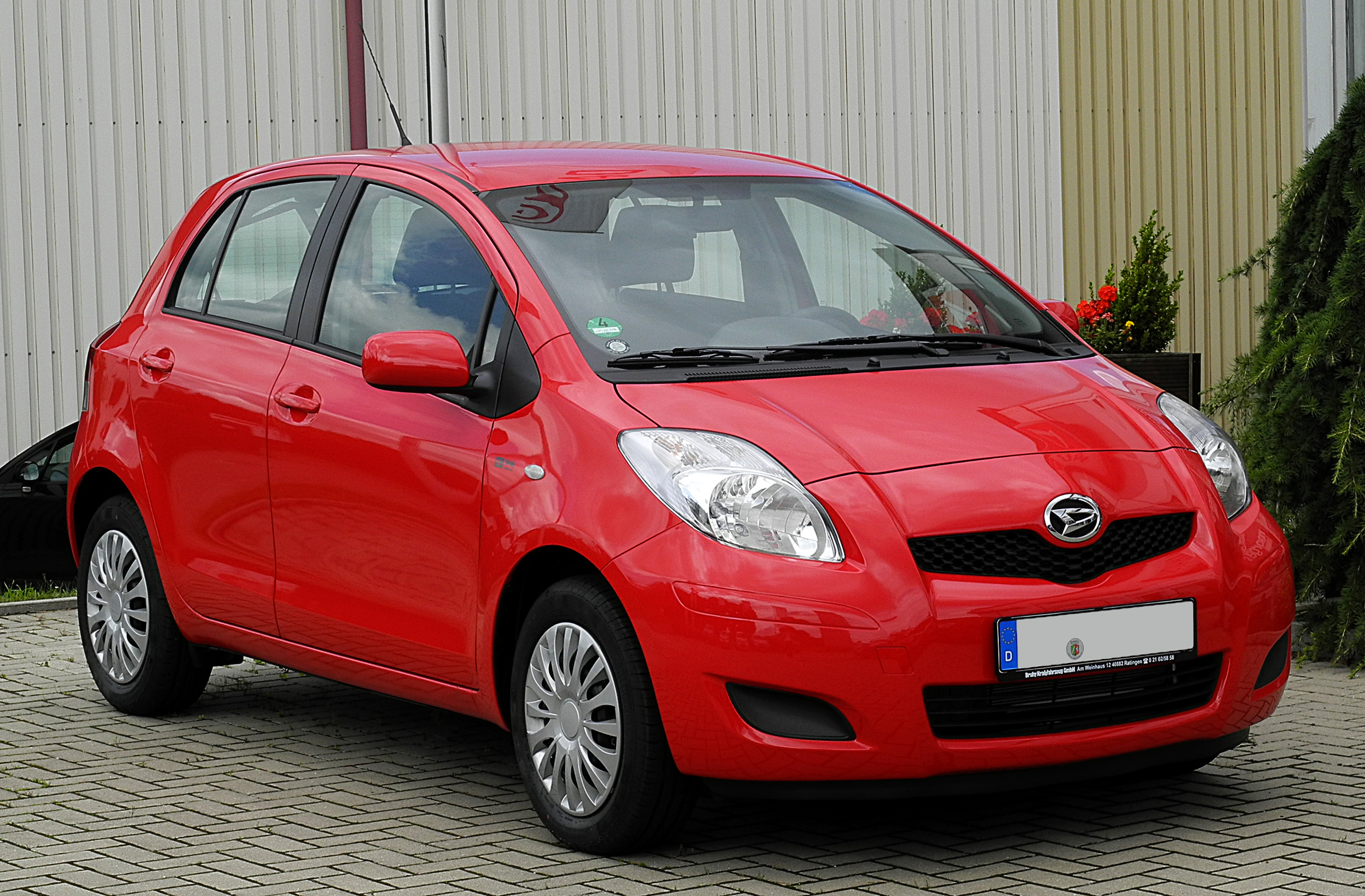 Daihatsu Charade 1.33 Basis (V)